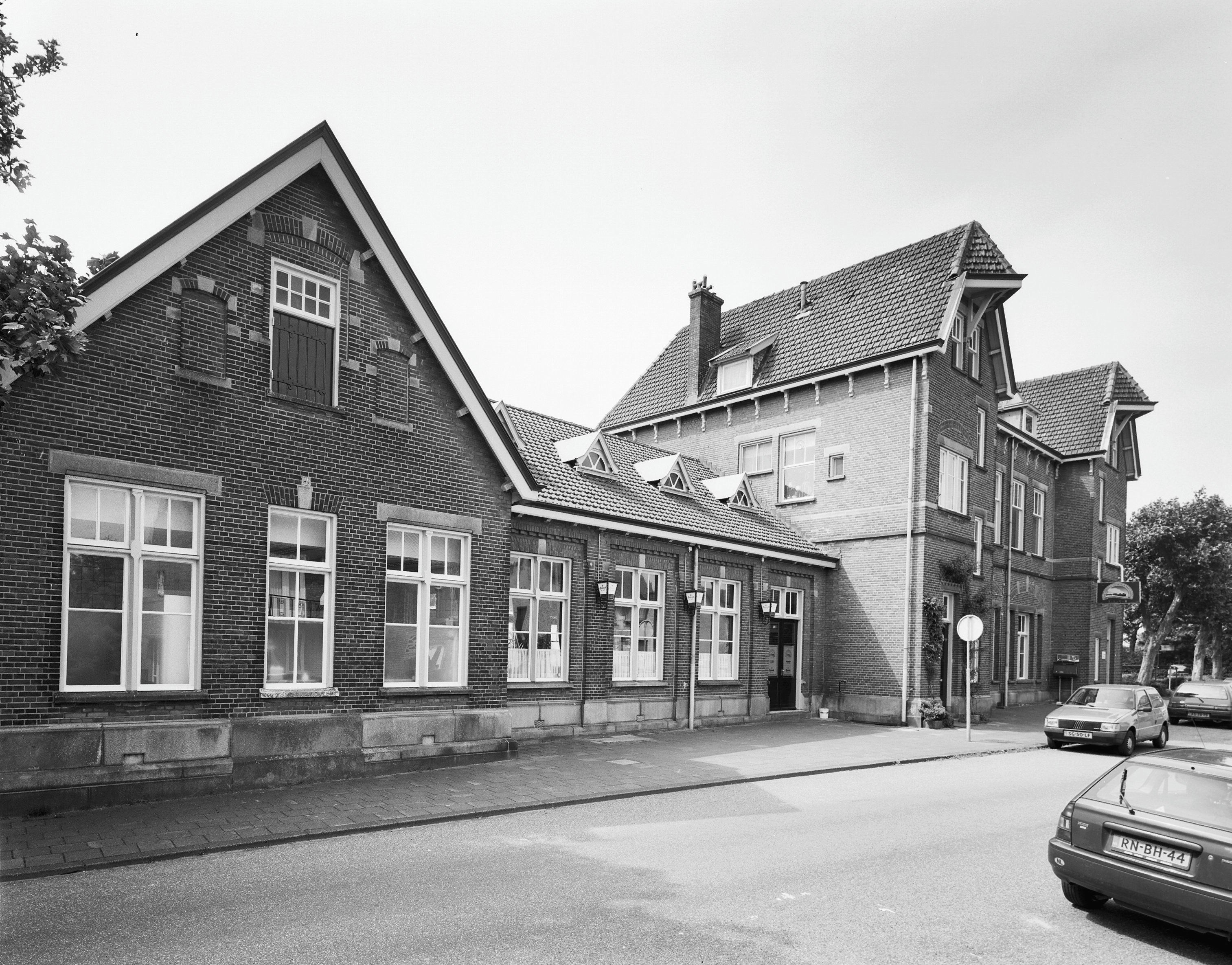 Zlsm Station Simpelveld: Overzicht voorgevel , gevel aan de straatzijde (opmerking: Gefotografeerd voor Monumenten In Nederland Limburg)